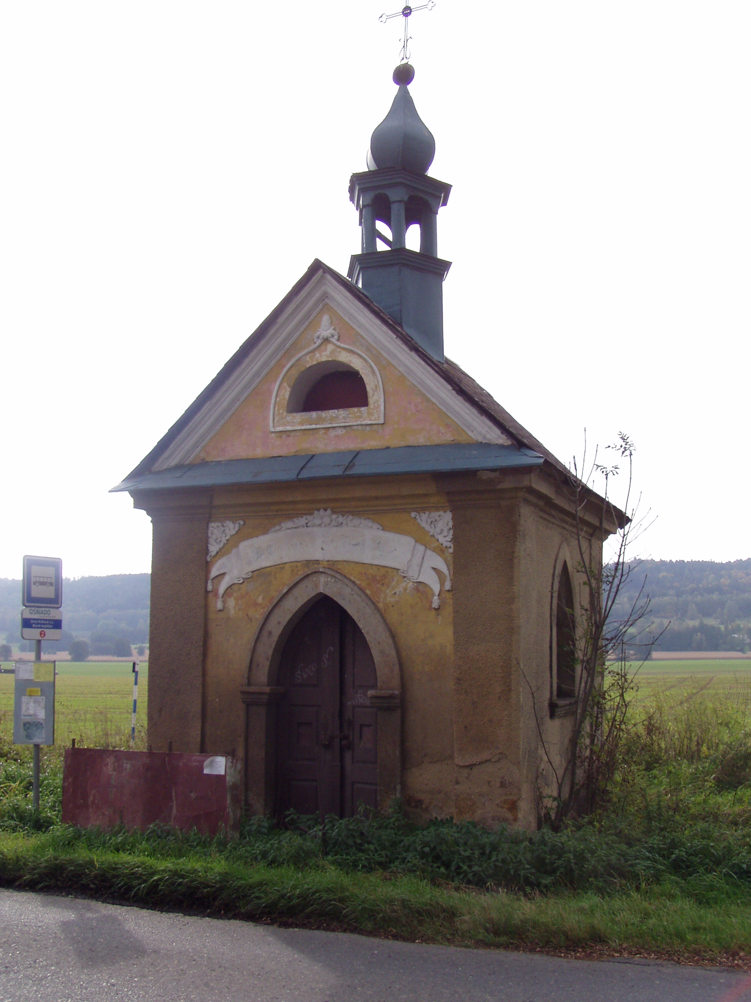 Kaple v Borku (Dvůr Králové nad Labem